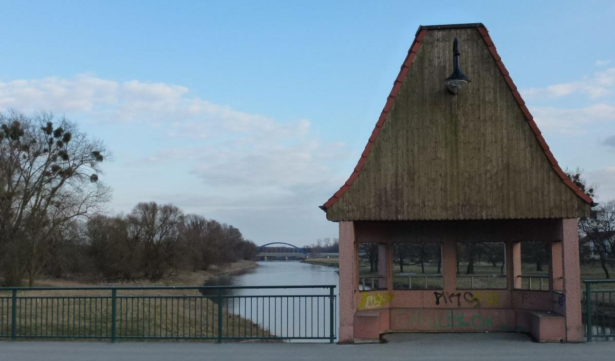 Blick von der 1999 errichteten Muldebrücke in Eilenburg auf die Eisenbahnbrücke und die Brücke der B 87